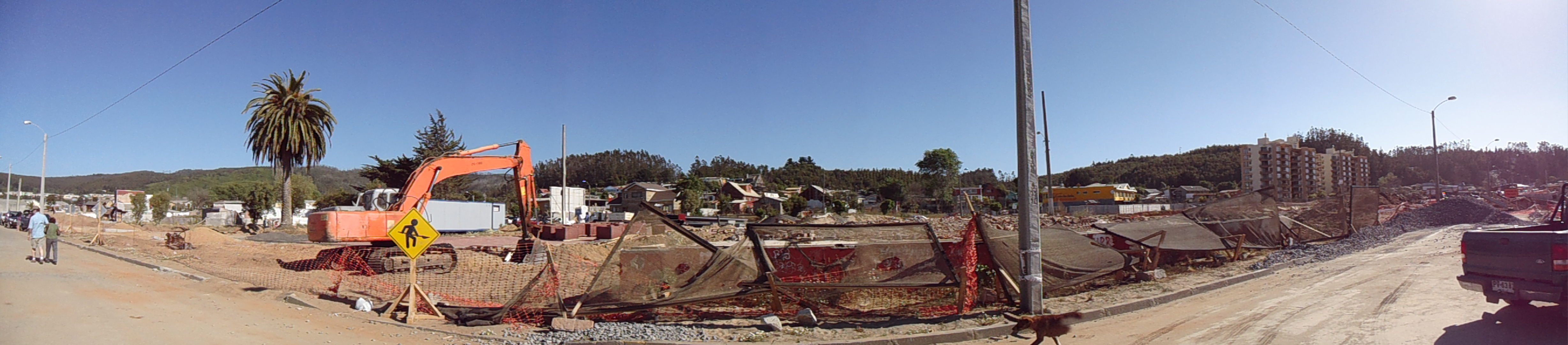 Dichato en Reconstruccion